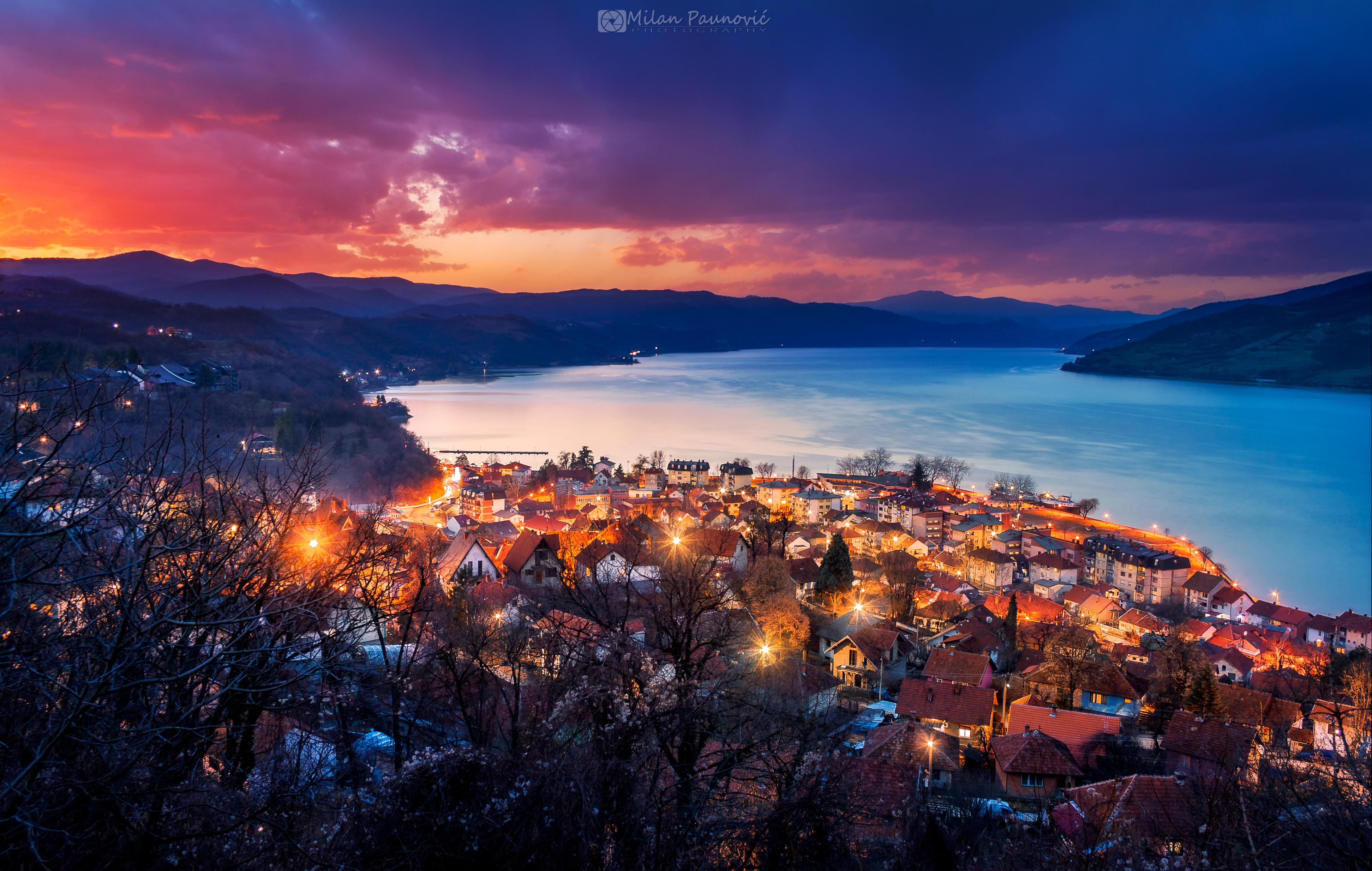 Srpski (latinica): Ово је фотографија заштићеног природног добра у Србији под шифром: НП04 This is a a photo of a natural area in Serbia with ID: НП04 Panorama Donjeg Milanovca, Nacionalni park Djerdap